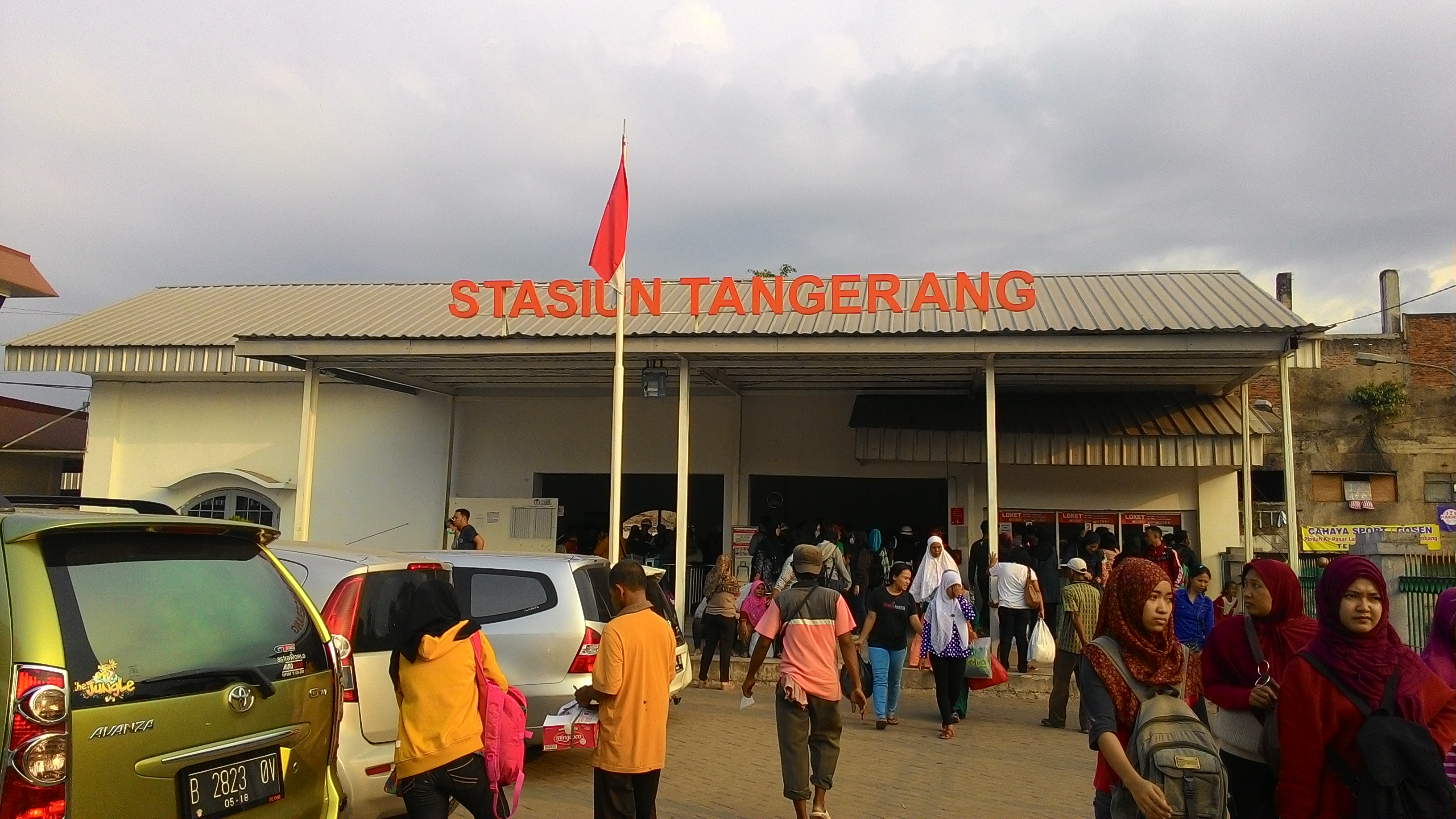 Pintu masuk Stasiun Tangerang bulan Mei 2015.